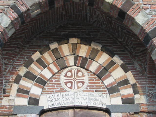 Chiesa dei SS Pietro e Paolo di Casalvecchio Siculo